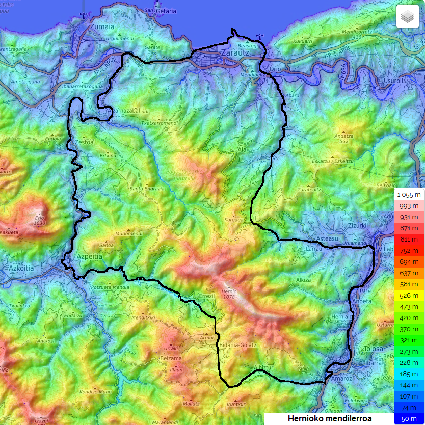 Hernioko mendilerroaren mapa topografikoa.